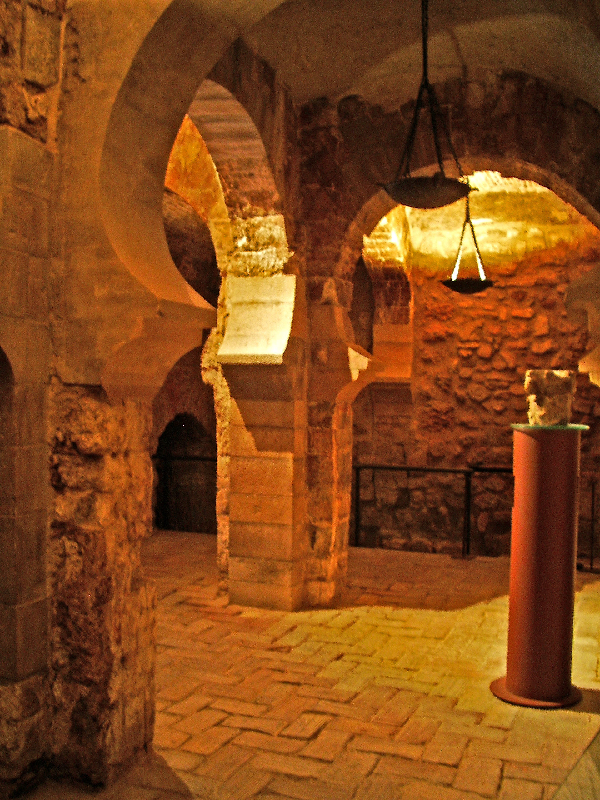 Torre del Trovador del Palacio de la Aljafería de Zaragoza (España). Planta baja.